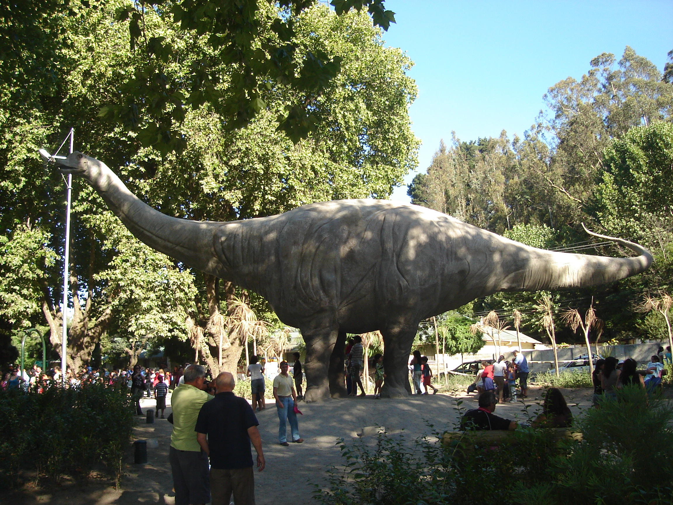 Diplodocus de 20 metros de largo en Plaza Jurasica de Concepción (Plaza Acevedo)